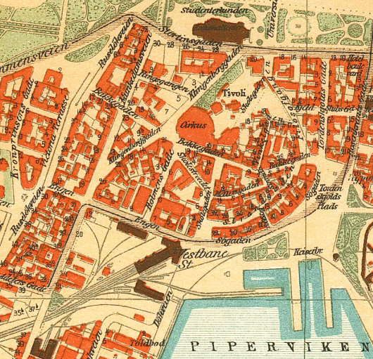 Kart over Vika (Pipervika).